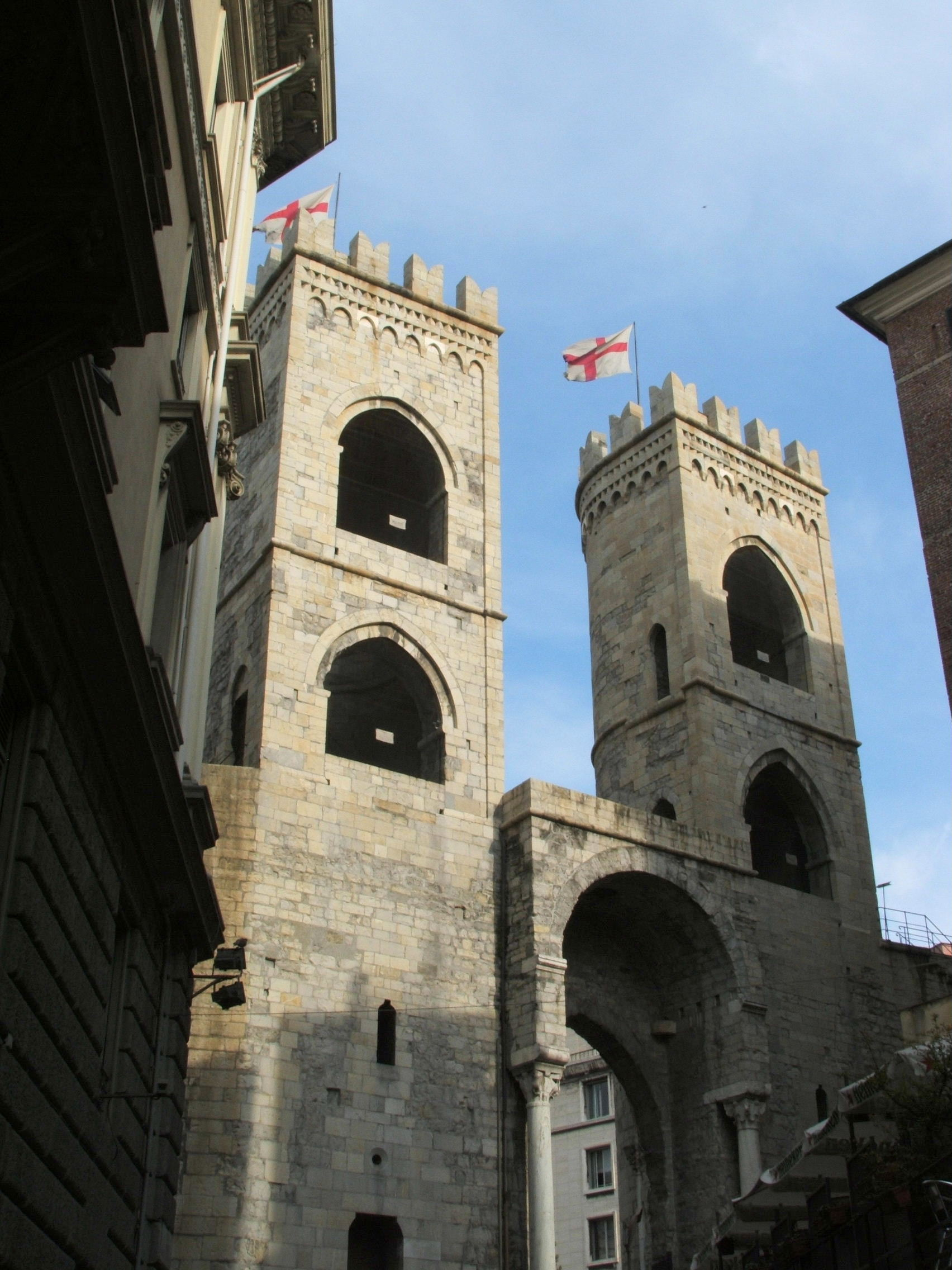 Genova, Piano di Sant'Andrea, la Porta Soprana